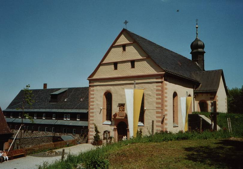 Sonntagsstimmung am Kloster Kreuzberg